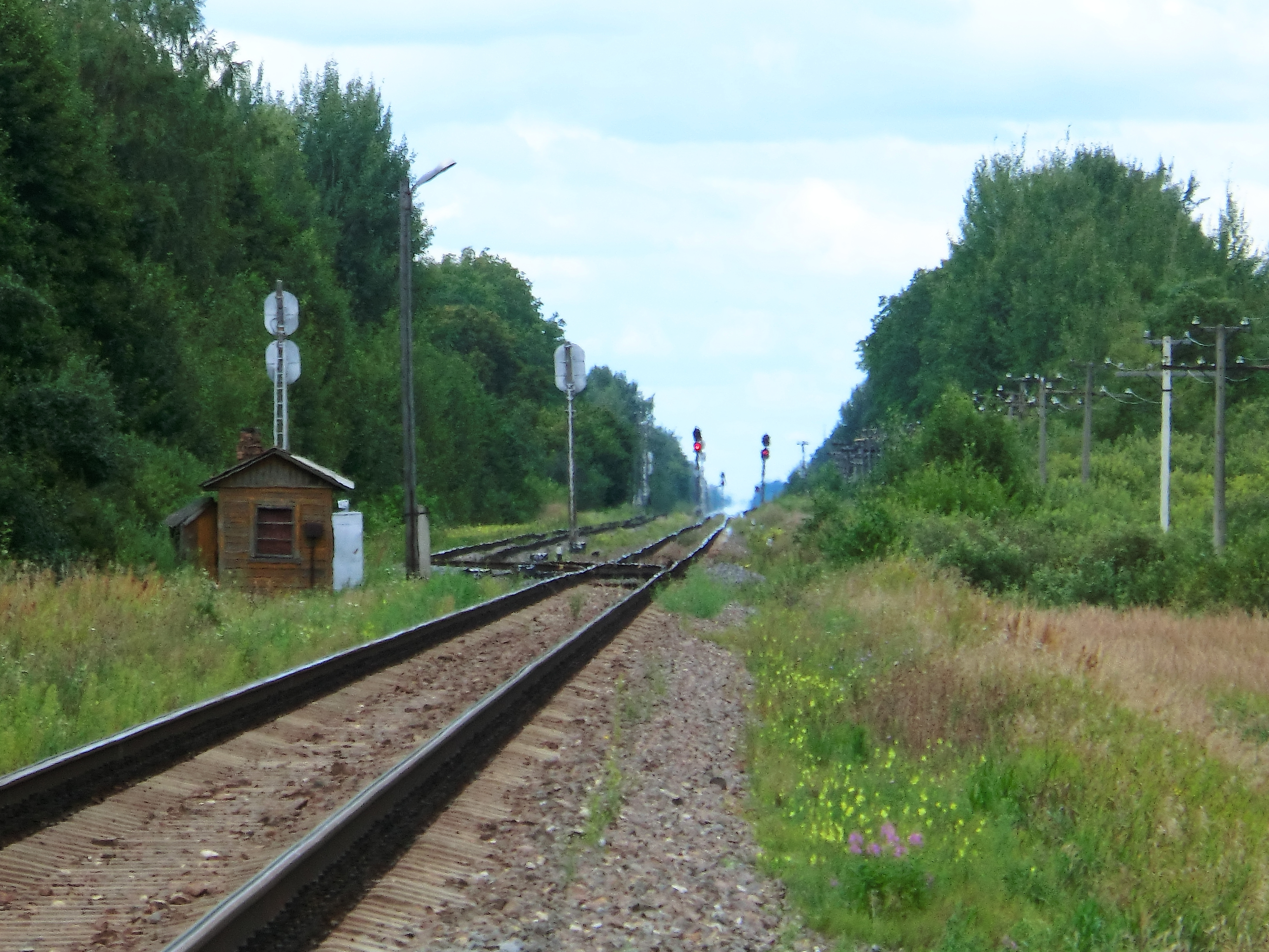 st. Pureņi